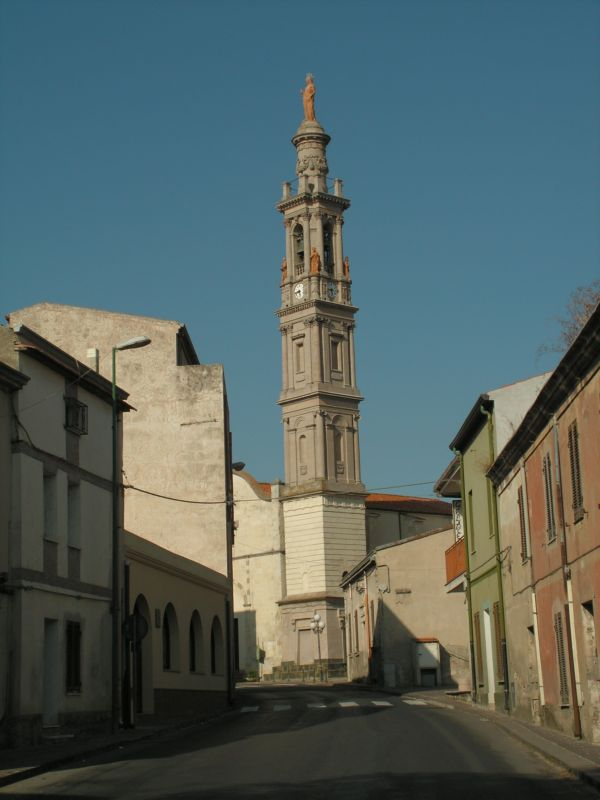 Io sono l'autore dell'immagine.